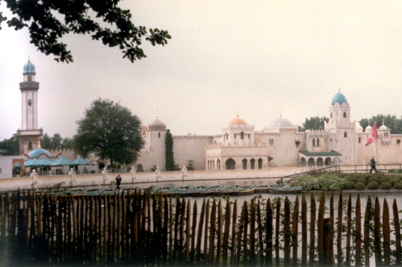 EftelingRoeivijverFata